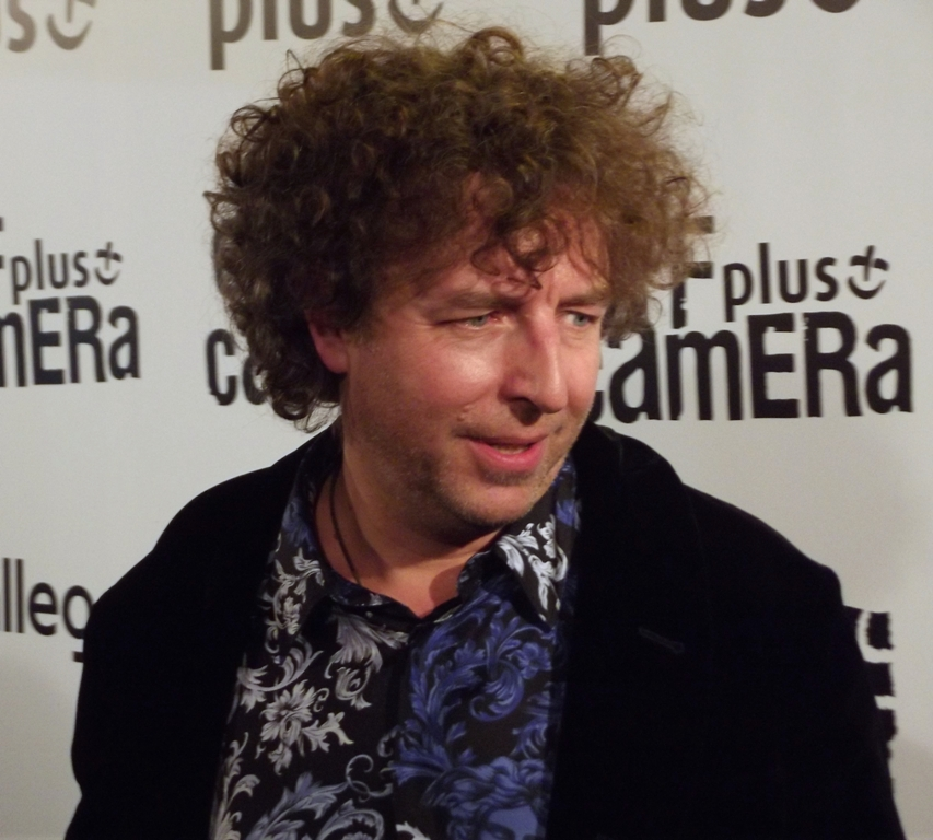 Zdjęcie zrobione podczas 6. edycji międzynarodowego festiwalu kina niezależnego Off Plus Camera.